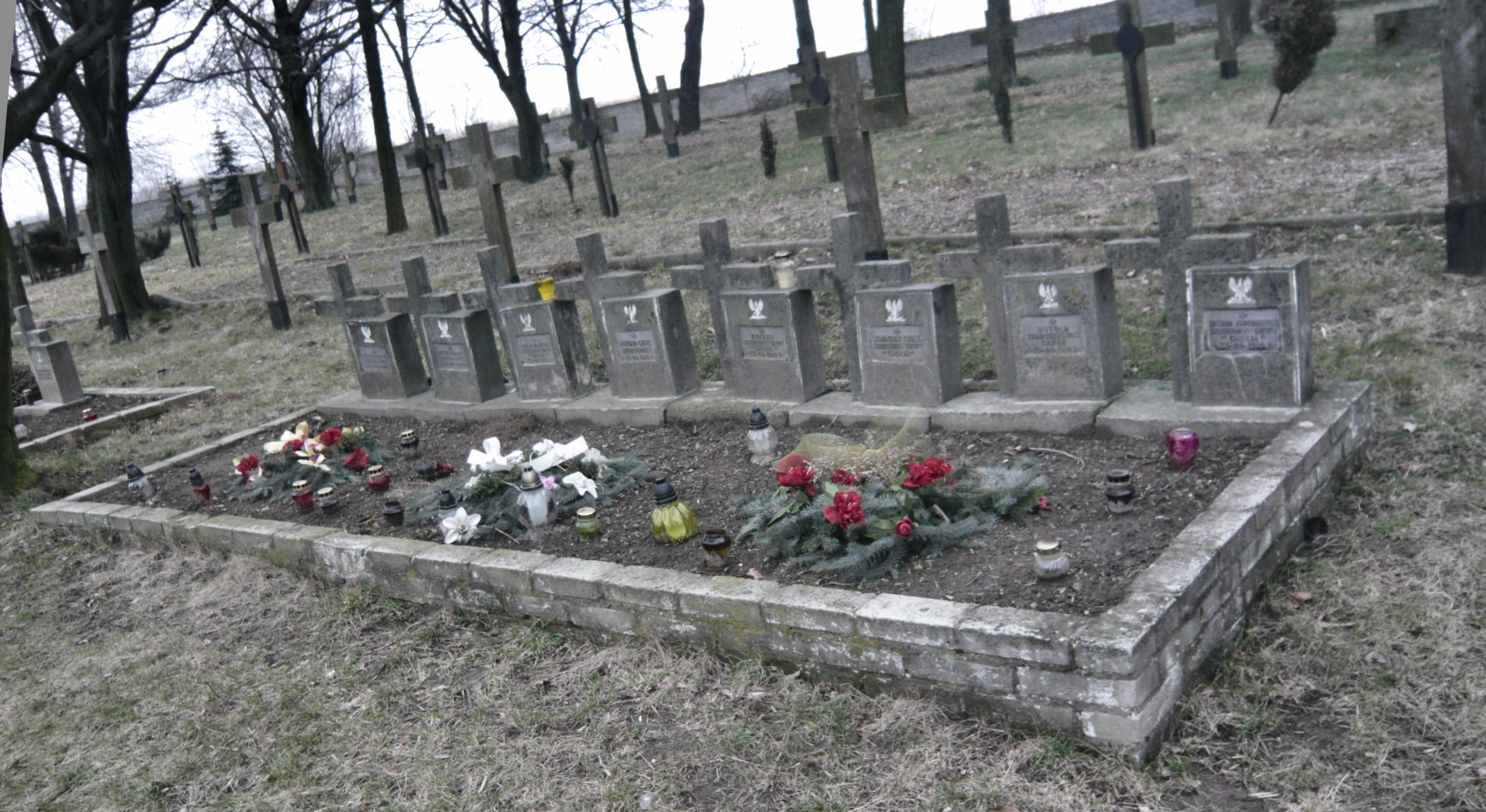 Boniewo - cmentarz z okresu I i II wojny światowej.